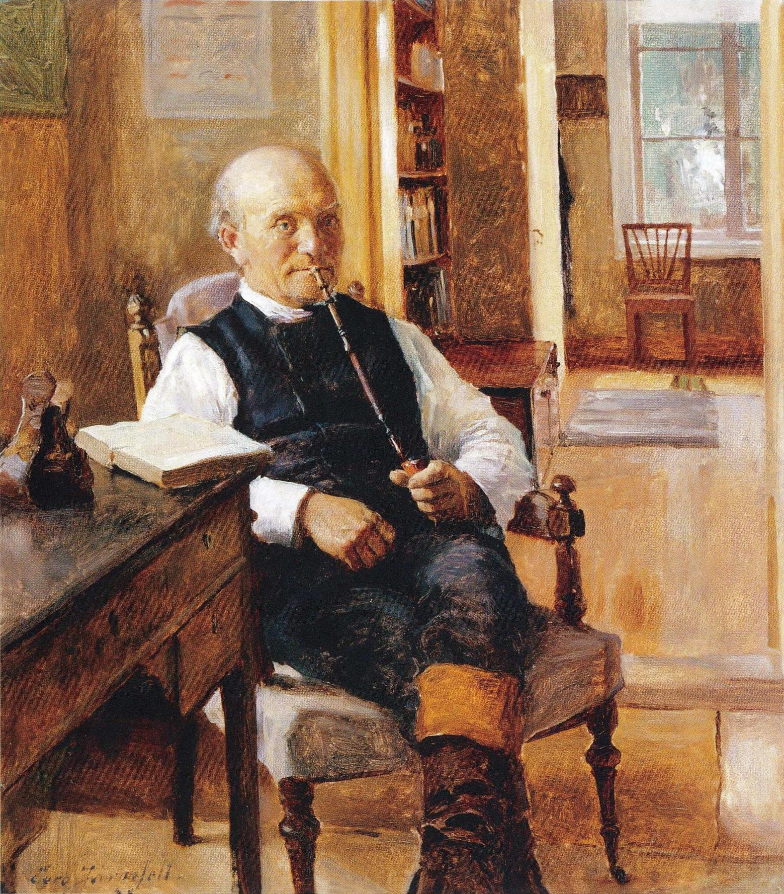 Rovasti Henrik Gustaf Theodor Brofeldt (1837–1914) kotonaan Iisalmen pappilassa.